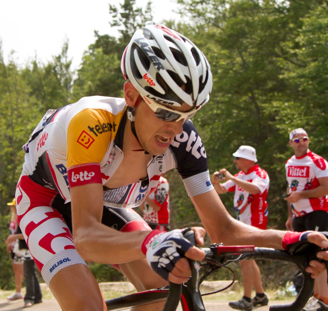 046 bart de clercq